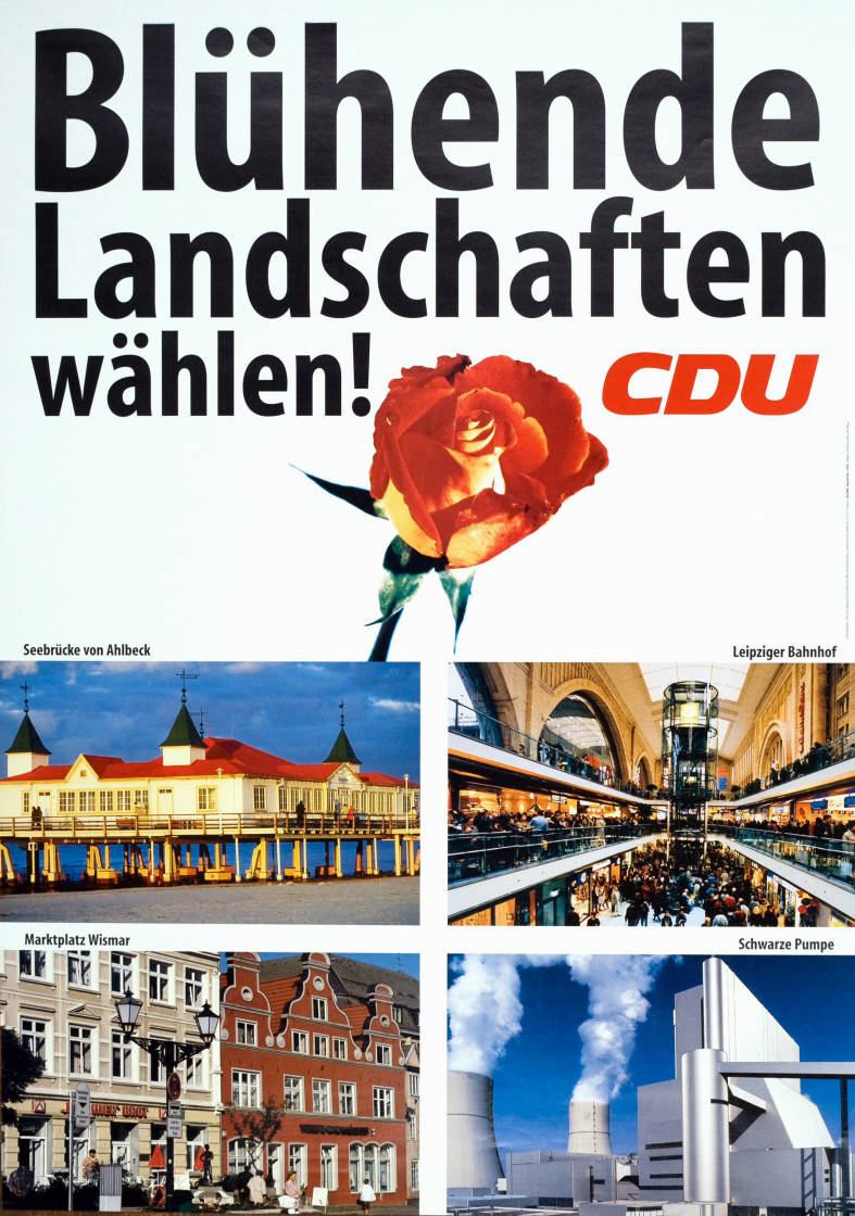 Blühende Landschaften wählen! CDU ... Abbildung:Blühende Rose, Seebrücke von Ahlbeck, Leipziger Bahnhof, Marktplatz Wismar, Schwarze Pumpe (Fotos)Plakatart:Motiv-/TextplakatKünstler_Grafiker:Fotos: Ullstein, Kohls, WeisflogAuftraggeber:CDU-Bundesgeschäftsstelle, Hauptabteilung Öffentlichkeitsarbeit, BonnObjekt-Signatur:10-001: 5015Bestand:Plakate zu Bundestagswahlen (10-001)GliederungBestand10-18:Plakate zu Bundestagswahlen (10-001) » Die 14. Bundestagswahl am 27. September 1998 » MotivplakateLizenz:KAS/ACDP 10-001: 5015 CC-BY-SA 3.0 DE